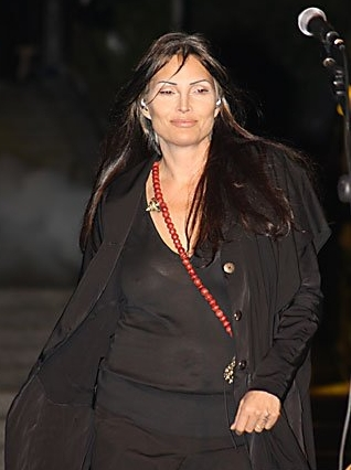 Anna Oxa